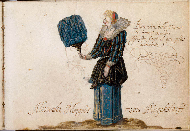 Het intrigerendste plaatje in het album: 'La dame au plumeau', met het ondeugende versje: Bon vin, belle Dames et bonne viande / Pendu soijt il qui plus demande... Zie ook: Image uploaded on 02-10-2013 from the Flickr stream of the Royal Library, The Hague (Koninklijke Bibliotheek, KB, national library of the Netherlands)